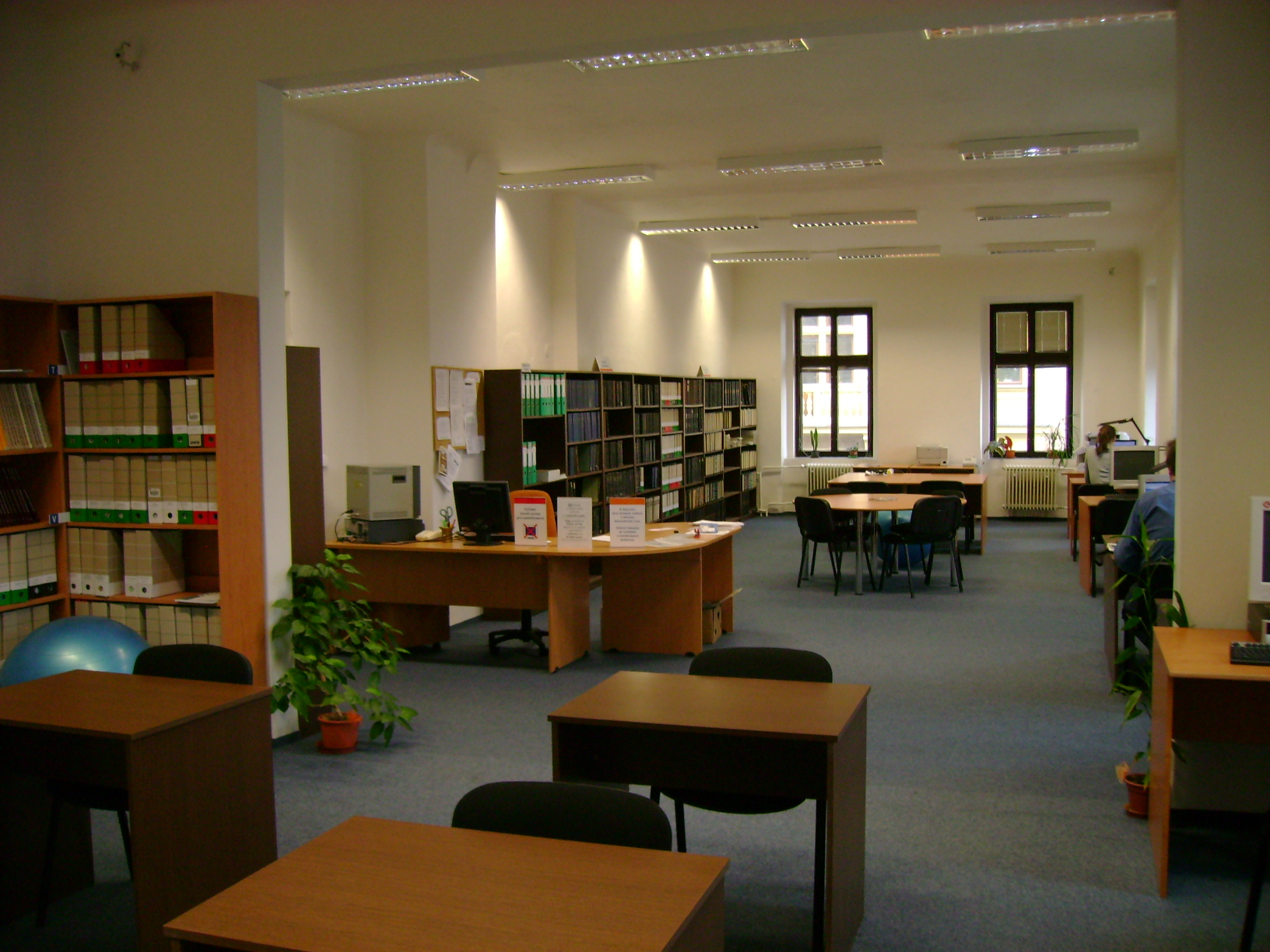 Interiér Univerzitní knihovny Západočeské univerzity